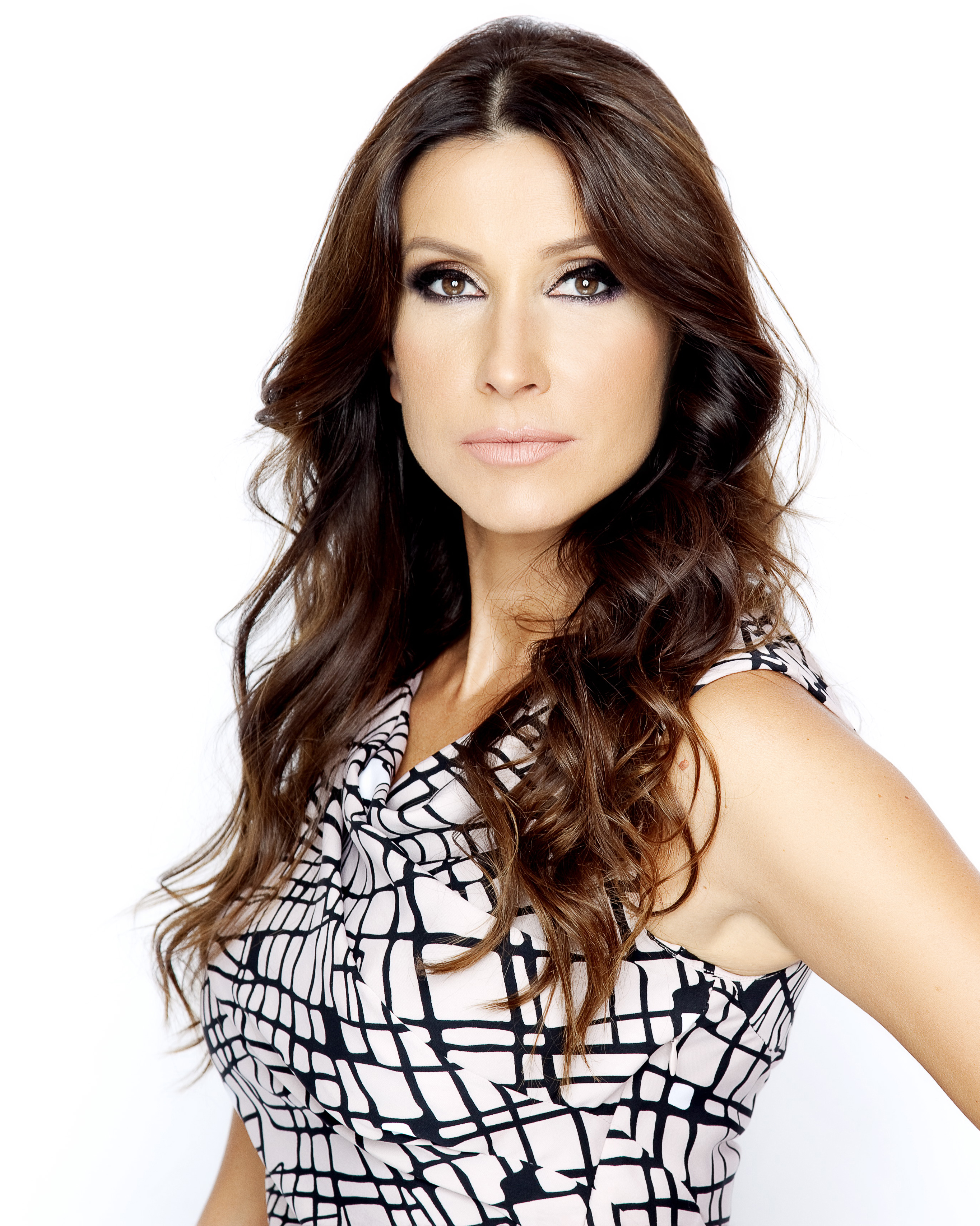 Template:Snežana Dakić Mikić